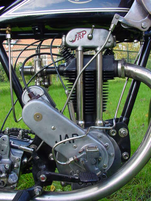 Toestemming van Yesterdays Antique Motorcycles ( Categorie: Afbeelding motorfiets